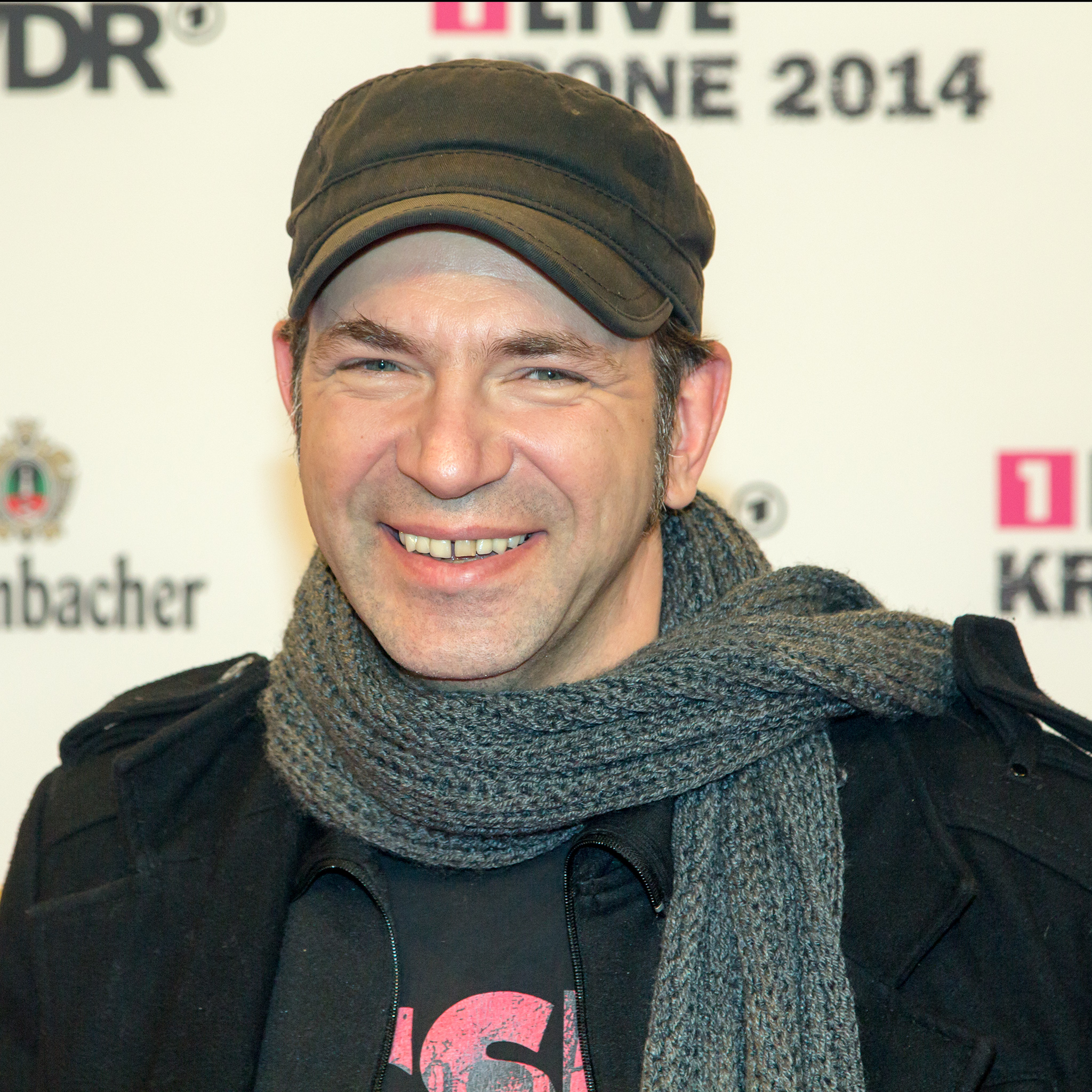 1LIVE Krone 2014 in der Bochumer Jahrhunderthalle: Ole Plogstedt auf dem roten Teppich